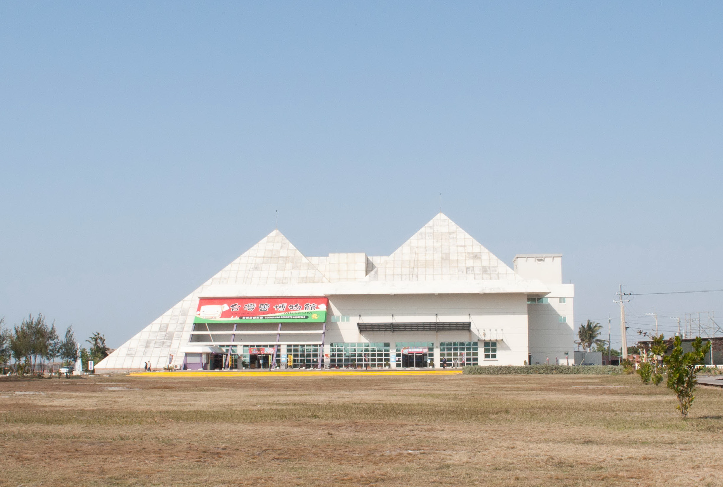 中文（台灣）: 臺灣鹽博物館（拍攝地點：台南市七股區中寮臺灣鹽博物館門口拍攝）